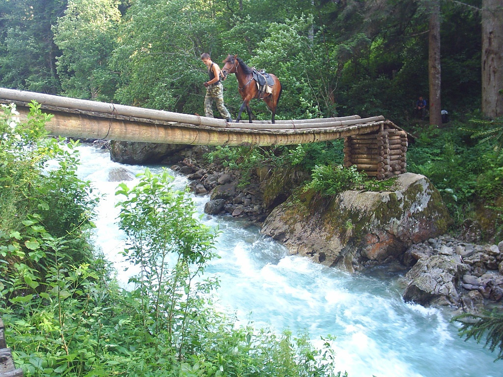 Река Цахвоа перед впадением в Лабу